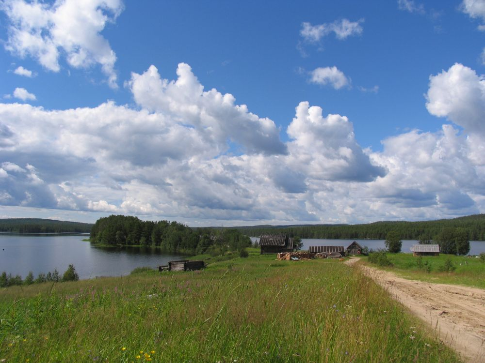 Vehehjärvi village in Karelia, Russia